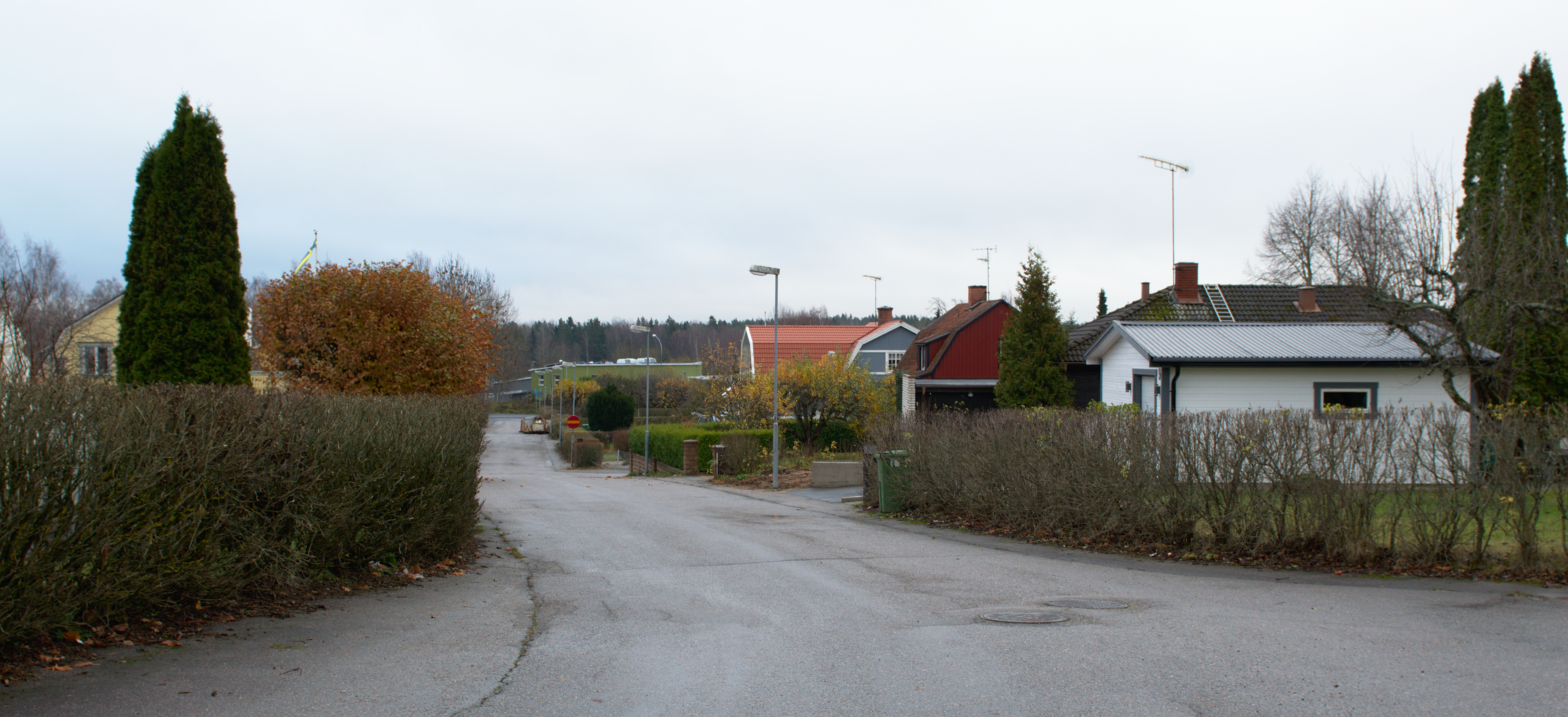 Berga i Eskilstuna kommun, hus längs Bergadalsvägen.